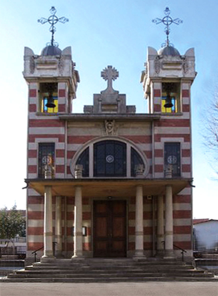 Liberty a Torino - La chiesa di Santa Elisabetta nel Villaggio Leumann. Uno dei rarissimi esempi di chiesta in stile liberty.